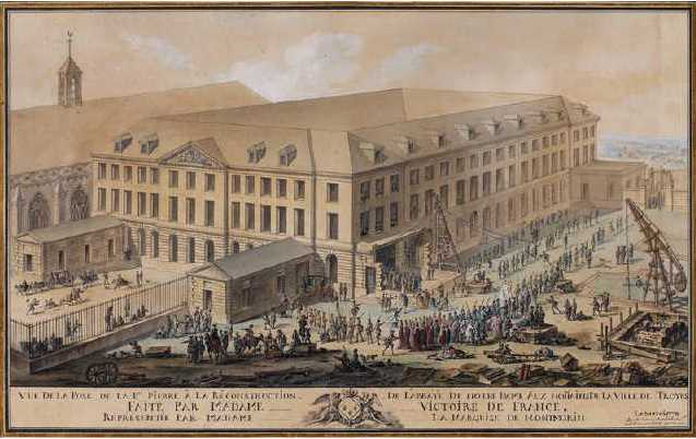 Reconstruction de l'Abbaye de Notre-Dame-aux-Nonains à Troyes. Plume et encre de chine, aquarelle et gouache blanche, 35 x 63. Annoté en bas dans la marge : Vue de la pose de la première pierre à la reconstruction de l'Abbaye de Notre Dame aux Nonains de la Ville de Troyes faite par Madame Victoire de France. Représentée par Madame la Marquise de Montmorin, le 30 avril 1778. Sur les dessins et conduite du Sr de Labrière, architecte à Paris.